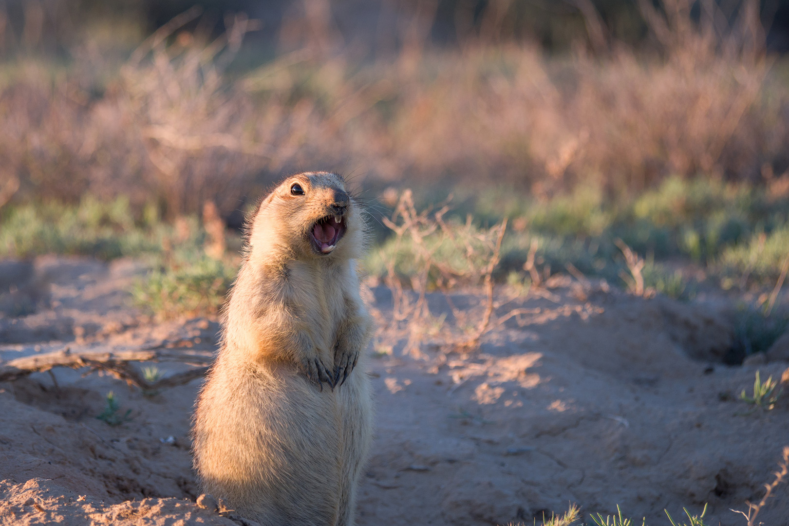 Крик желтого суслика